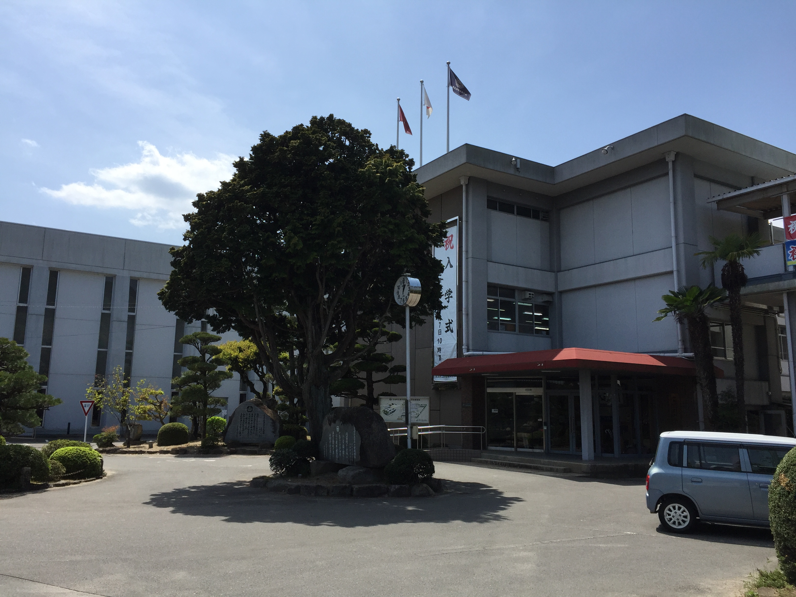 広島県府中市の県立府中高等学校